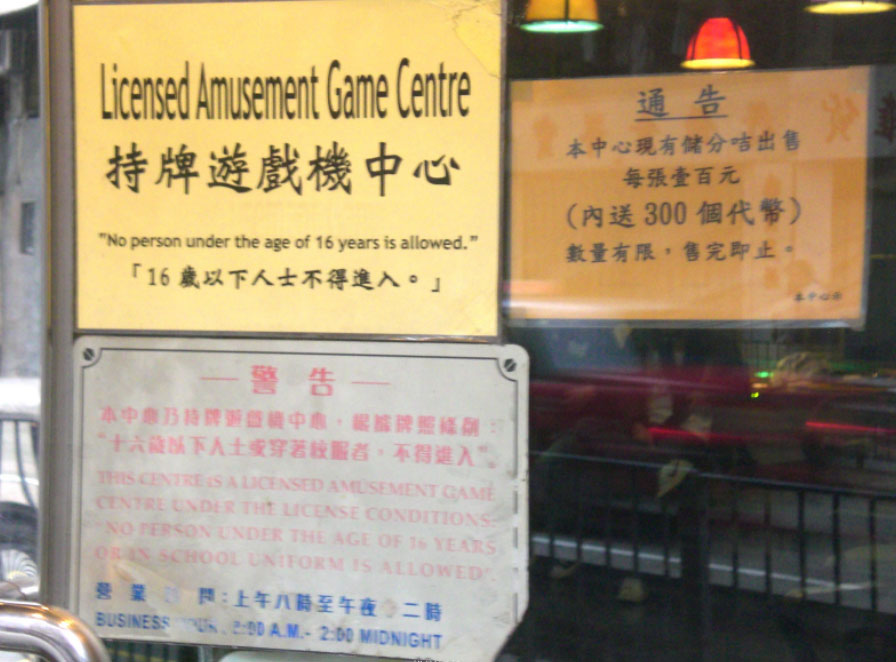 粵語: 機鋪